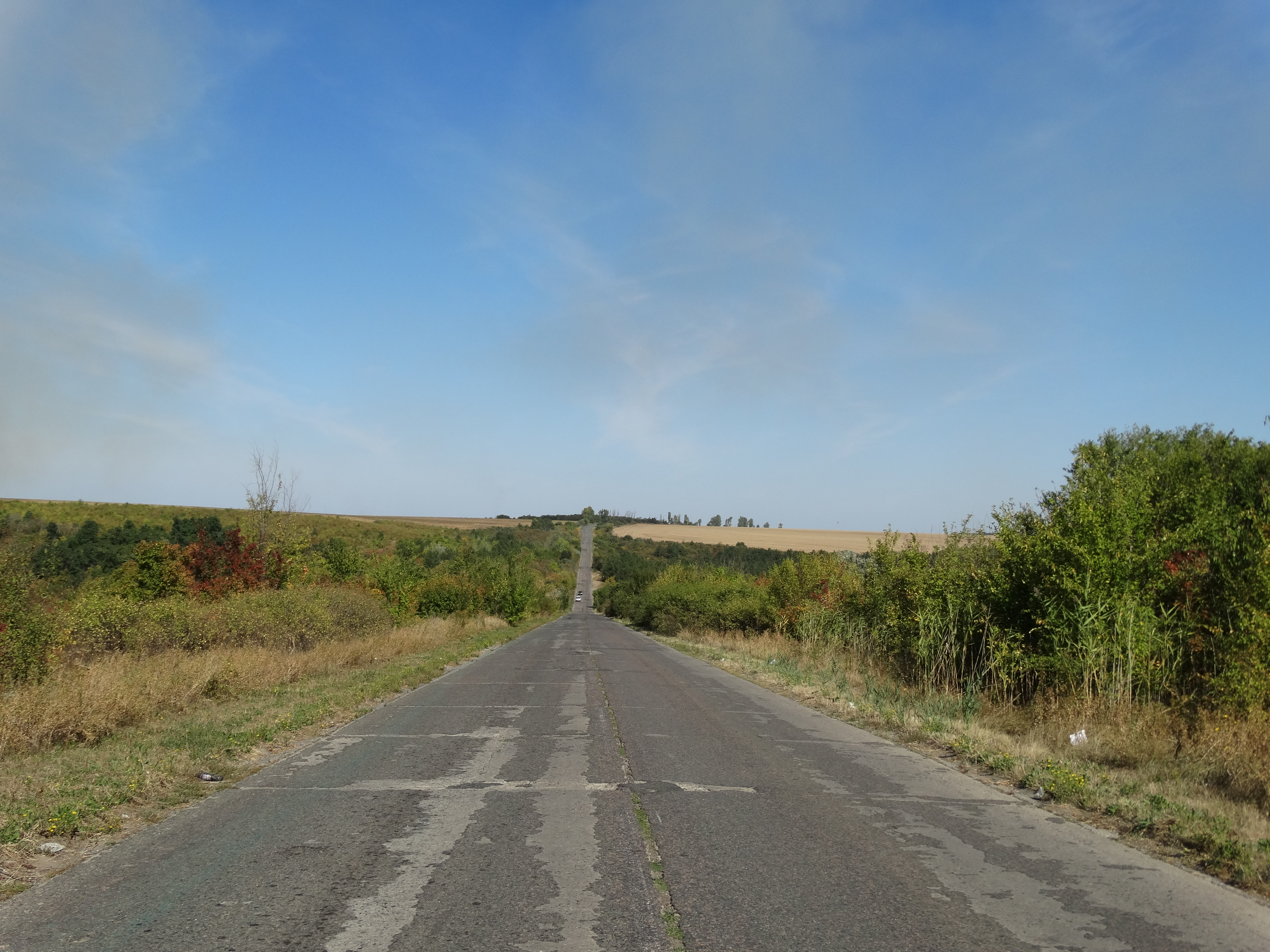 Вікіекспедиція на північ Одещини